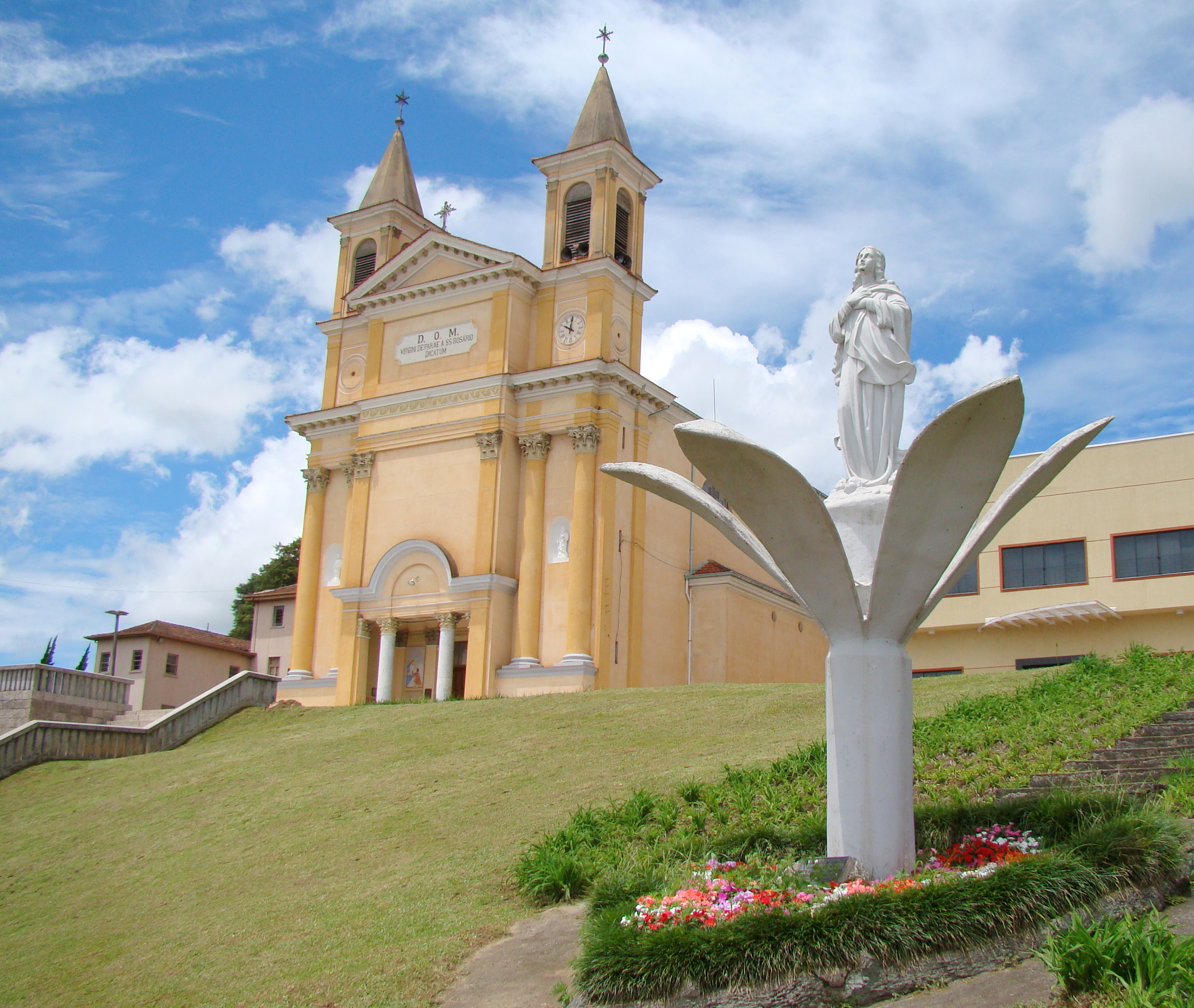 Igreja Matriz Nossa Senhora do Rosário, em Colombo, município da Grande Curitiba, no estado do Paraná (sul do Brasil). Obra iniciada em 1898, em estilo romano, sendo uma cópia fiel das igrejas italianas.